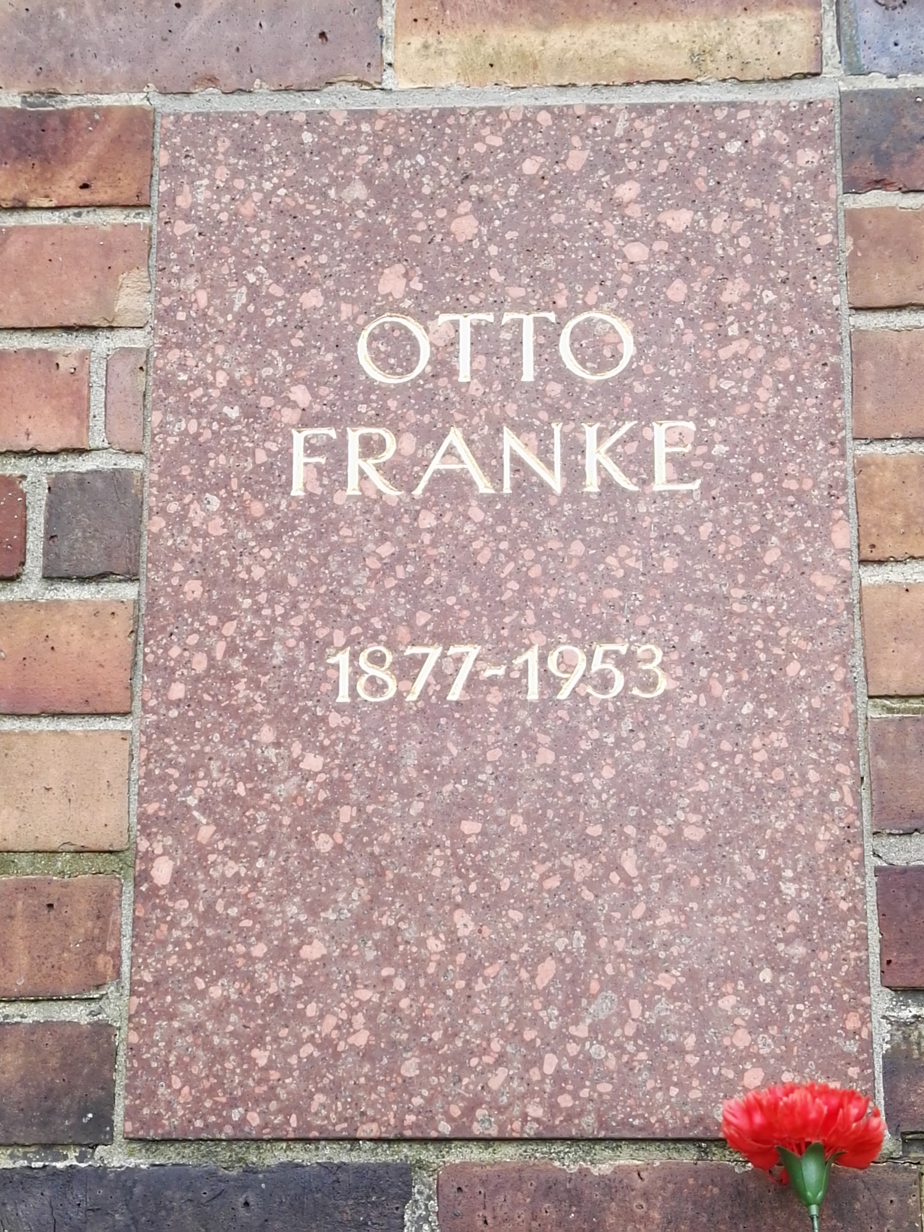 Grab von Otto Franke in der Gedenkstätte der Sozialisten auf dem Zentralfriedhof Friedrichsfelde in Berlin-Lichtenberg